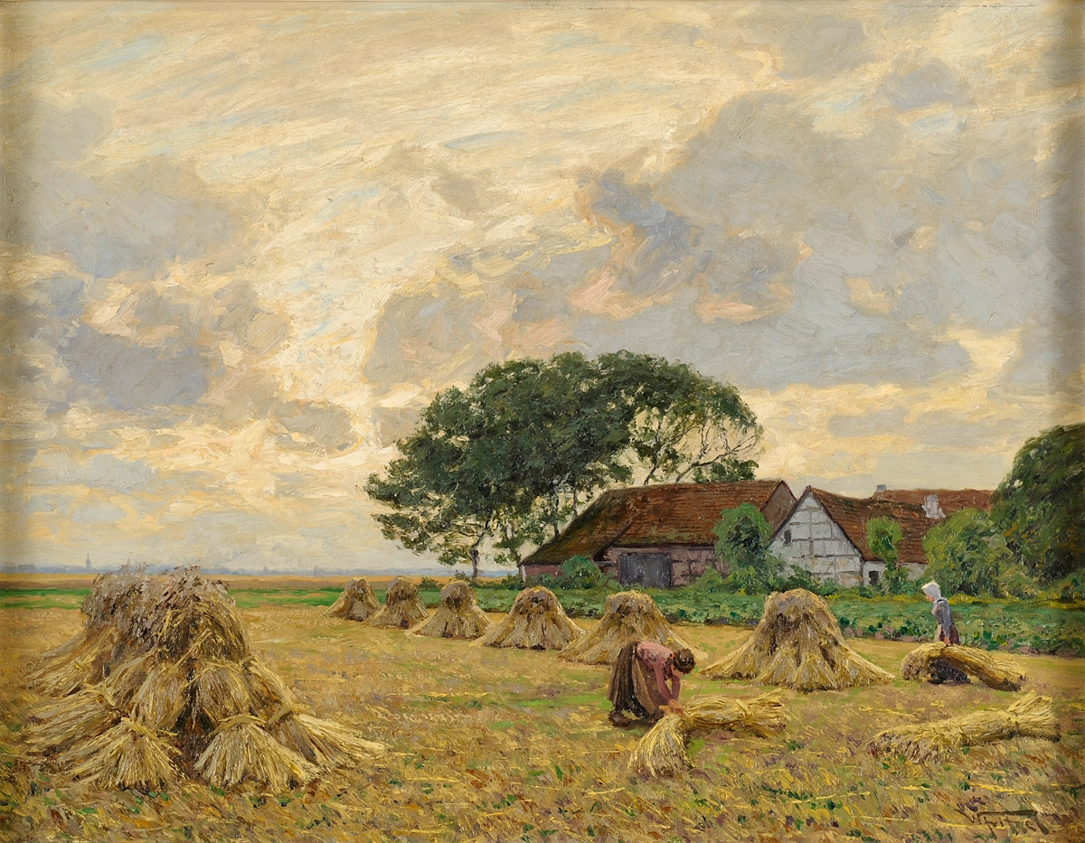 Kornernte. Signiert. Öl/Lwd., 70 x 90 cm.